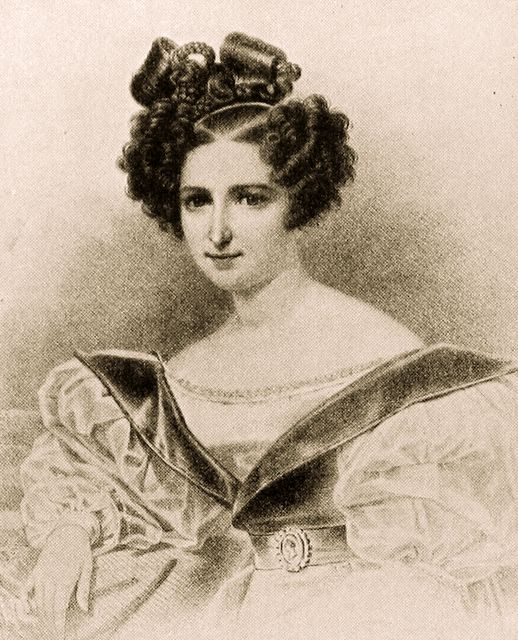 Wilhelmine Schroeder-Devrient (1804-1860), german singer